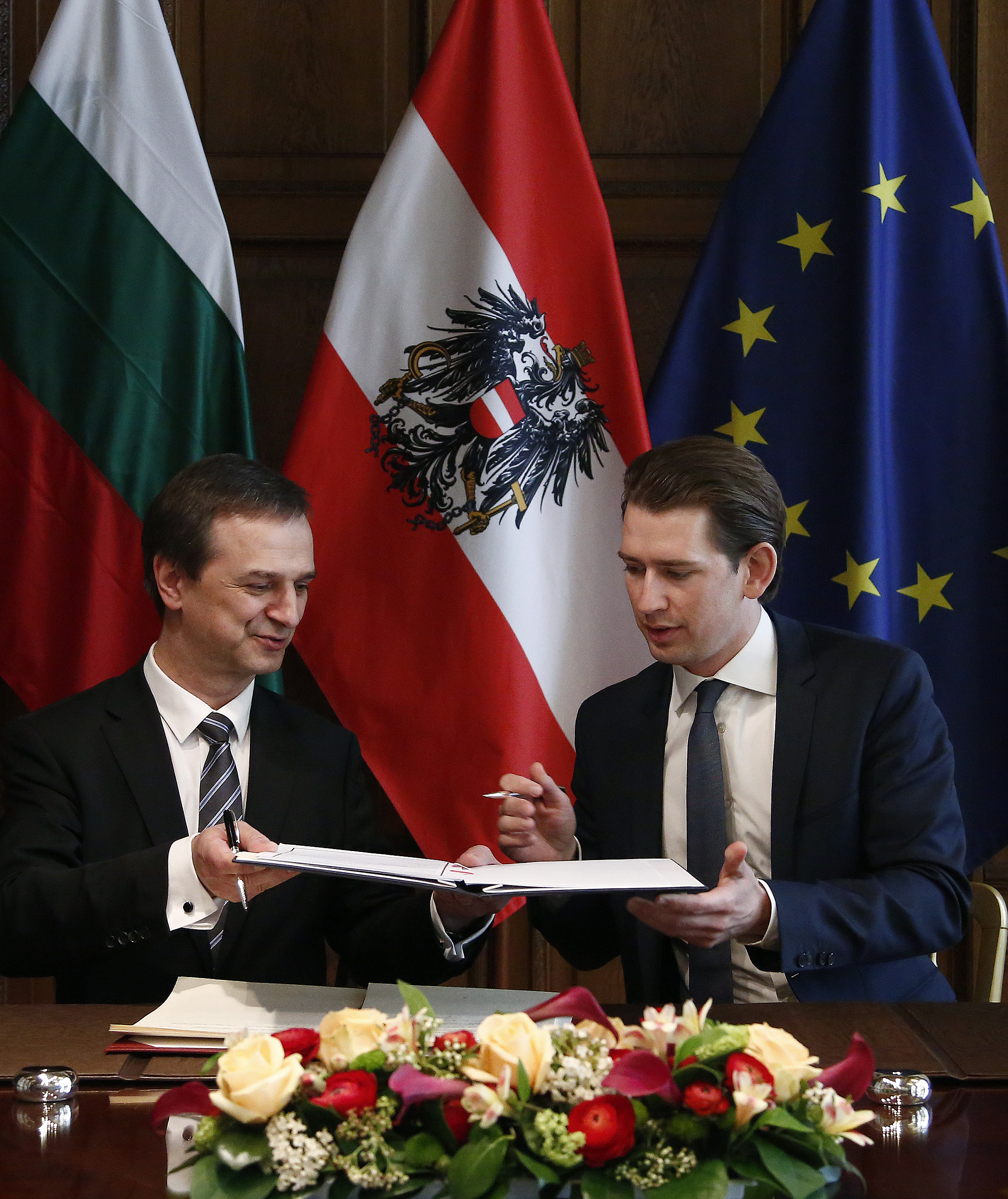 Bundesminister Sebastian Kurz trifft den bulgarischen Außenminister Radi Naidenov. Wien, 14.03.2017, Foto: Dragan Tatic